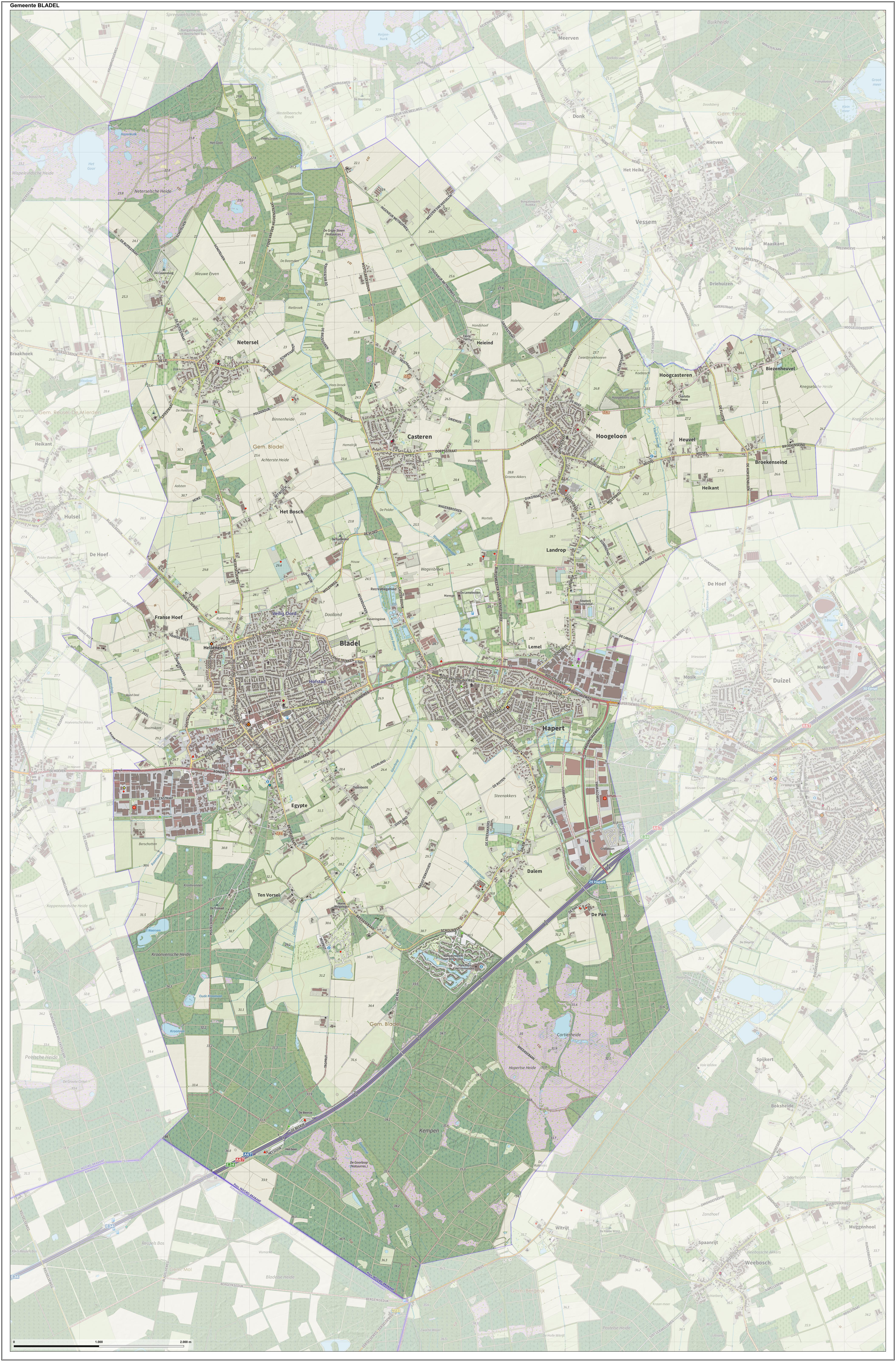 Topografische gemeentekaart. Resolutie: 400 pixels/km. Kaartbeeld samengesteld uit de open geodata van de Top10NL en Top25namen (Kadaster), Creative Commons-BY licentie. Gebouwvlakken uit open geodata BAG extract. Wegen uit de OpenStreetMap, OpenStreetMap community. Reliëfschaduw uit de Actuele Hoogtekaart AHN2. Samenstelling en kleurenschema: Jan-Willem van Aalst, met QGIS. Zie ook de Legenda.